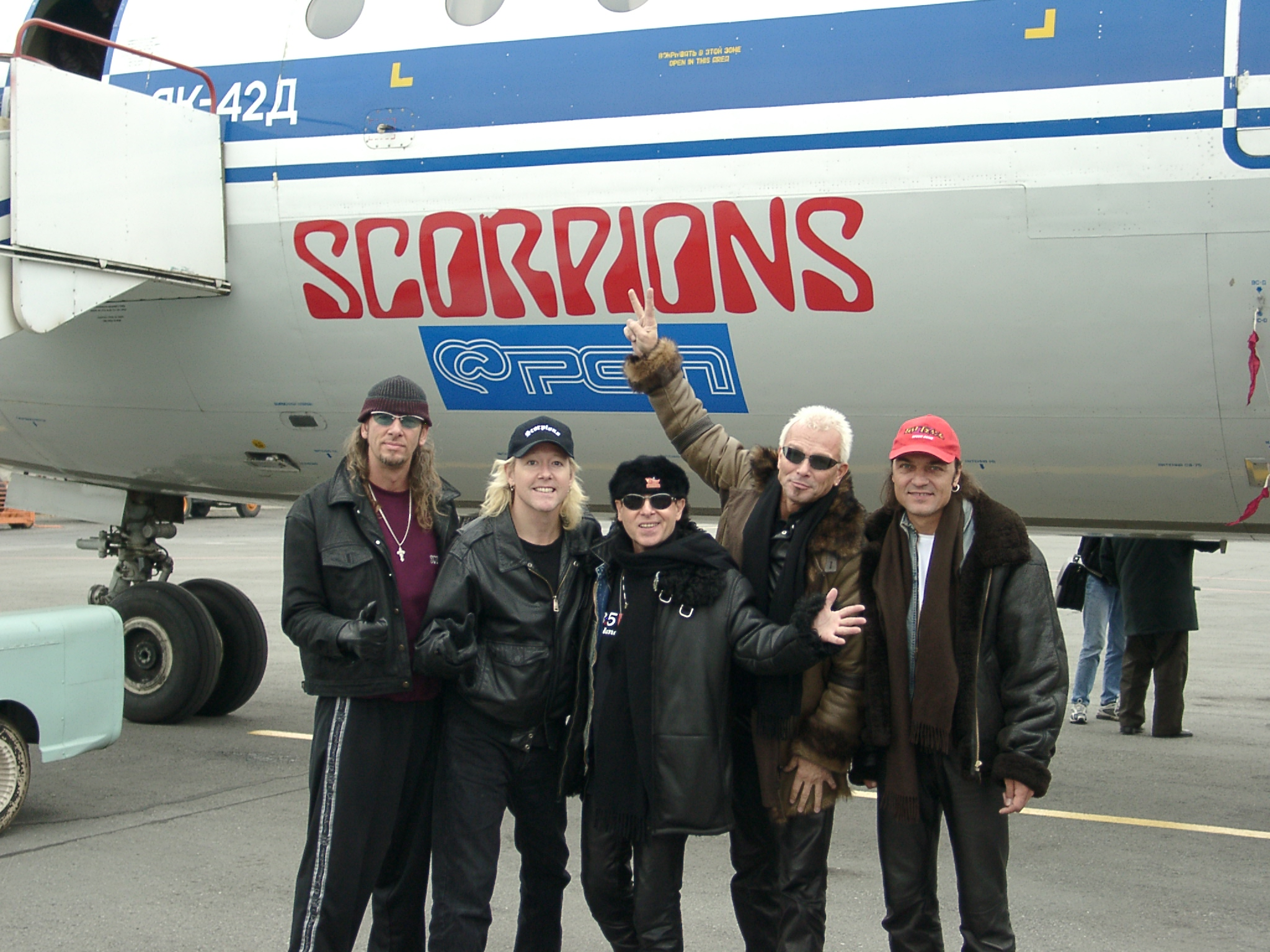 Die Scorpions während der Tour durch die ehemalige Sowjetunion (Foto : Lars Wulff)